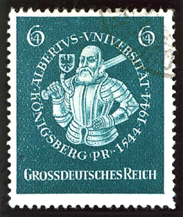 Sonderbriefmarke - Ausgabe Juli 1944 - Zum 400. Geburtstag der Albertus - Universitaet in Koenigsberg